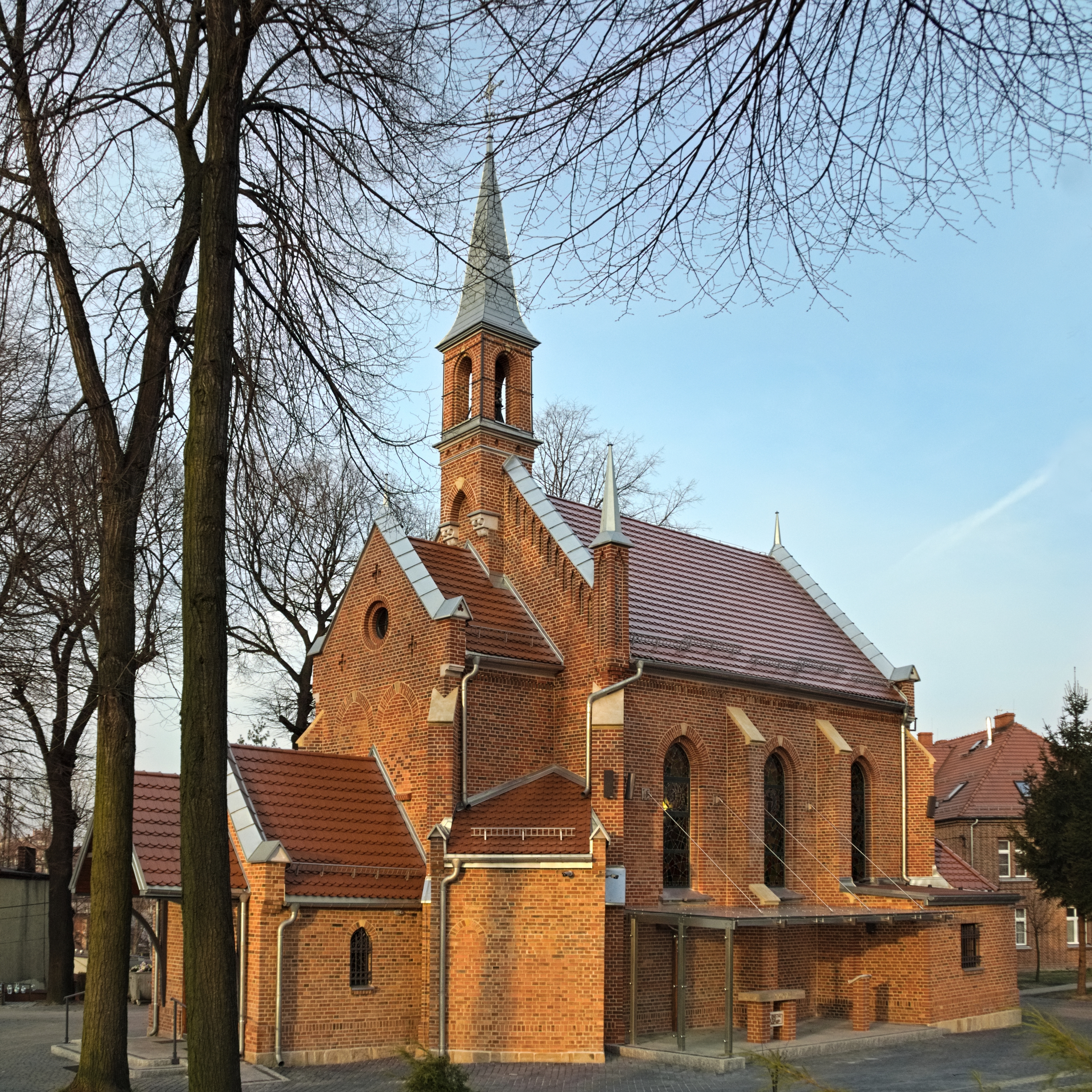 kościół św. Małgorzaty w Bytomiu otoczony cmentarzem; wewnątrz kościoła znaleziono pochówki dzieci (źródło